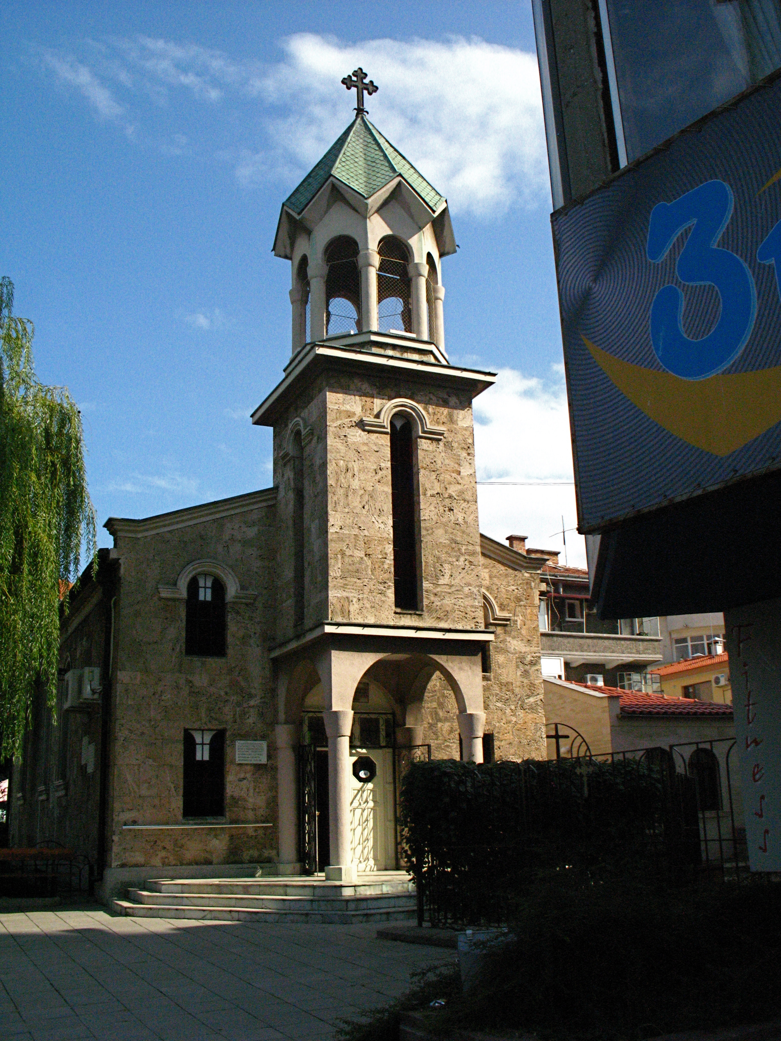 Бургас_4250